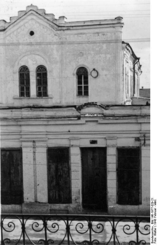 Mogilew frühere Synagoge, heute Archiv in Mogilew Februar/März 1943 Film 46-26